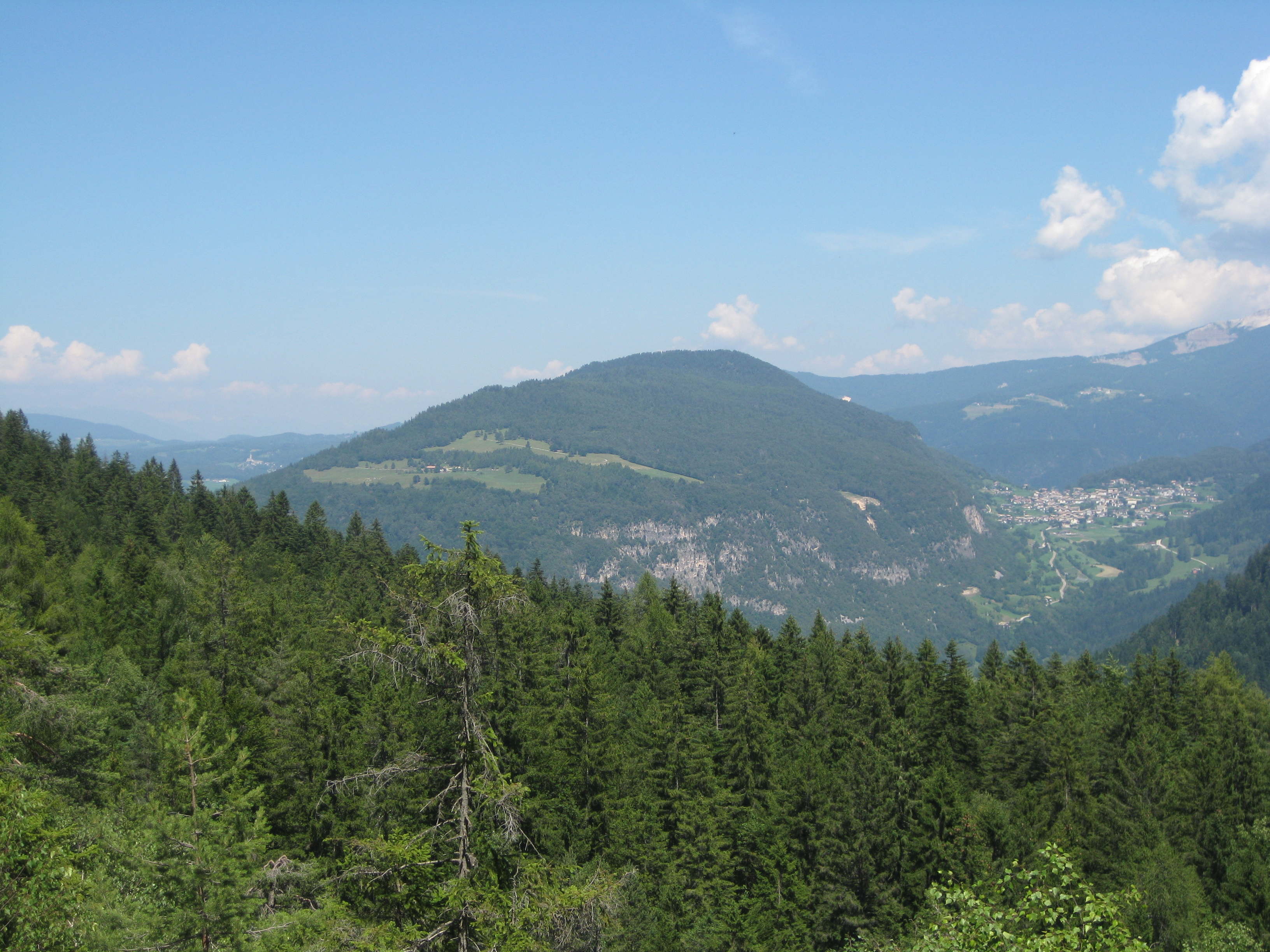 Cislon (auch Cucul genannt) im Süden Südtirols, gesehen von der südlich gelegenen Königswiese aus